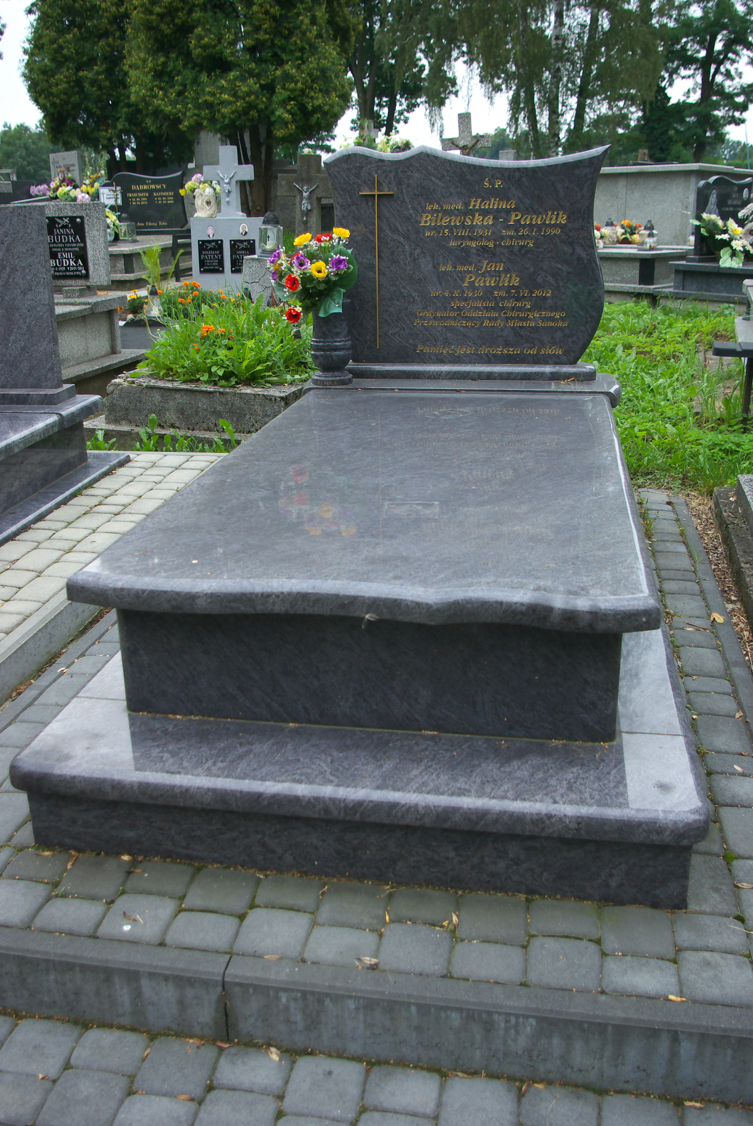 Grobowiec Haliny i Jana Pawlik w części "Matejki Stary" Cmentarza Centralnego w Sanoku